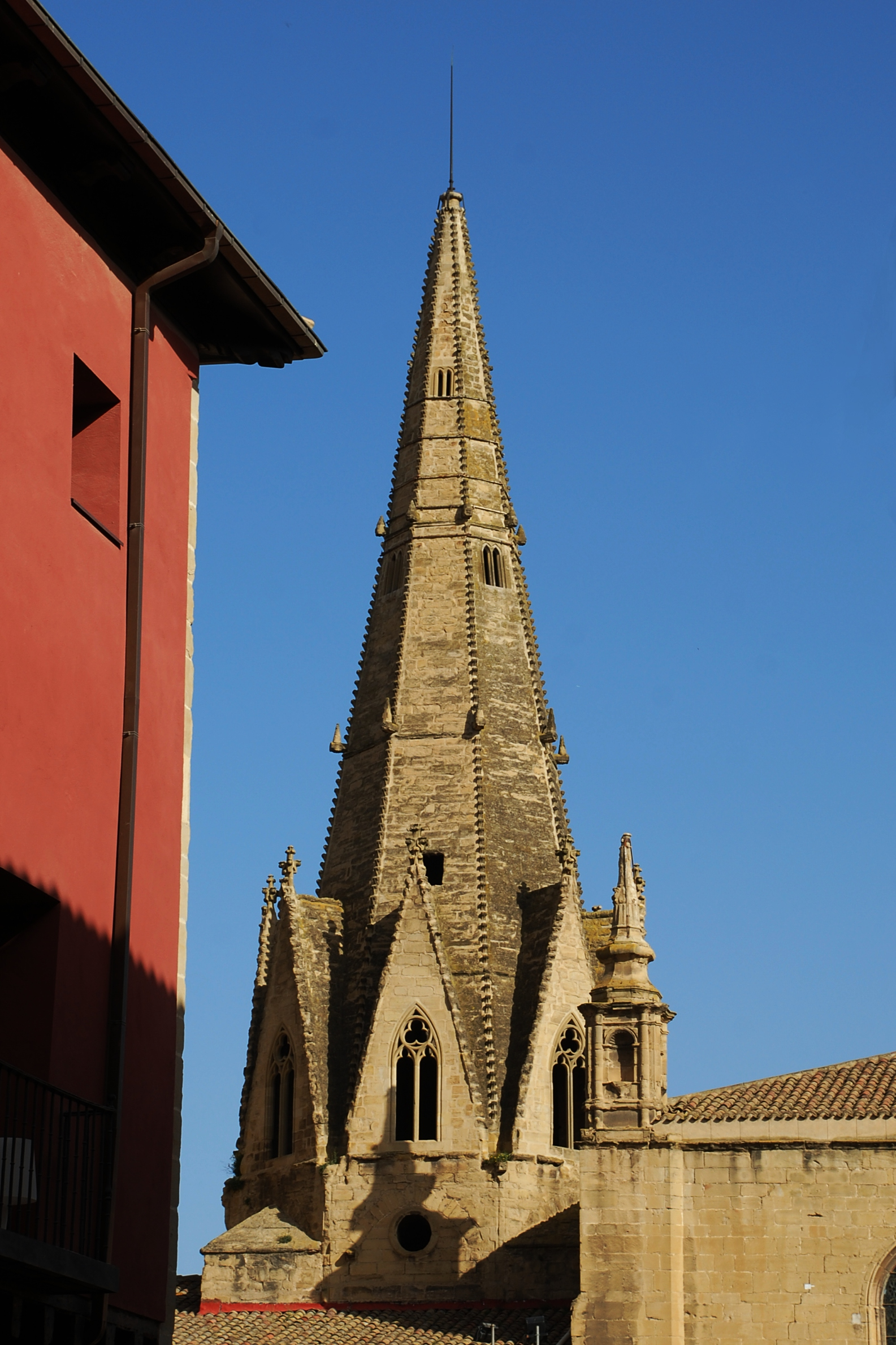 Aguja de la iglesia de Santa María de Palacio en Logroño, La Rioja (España).